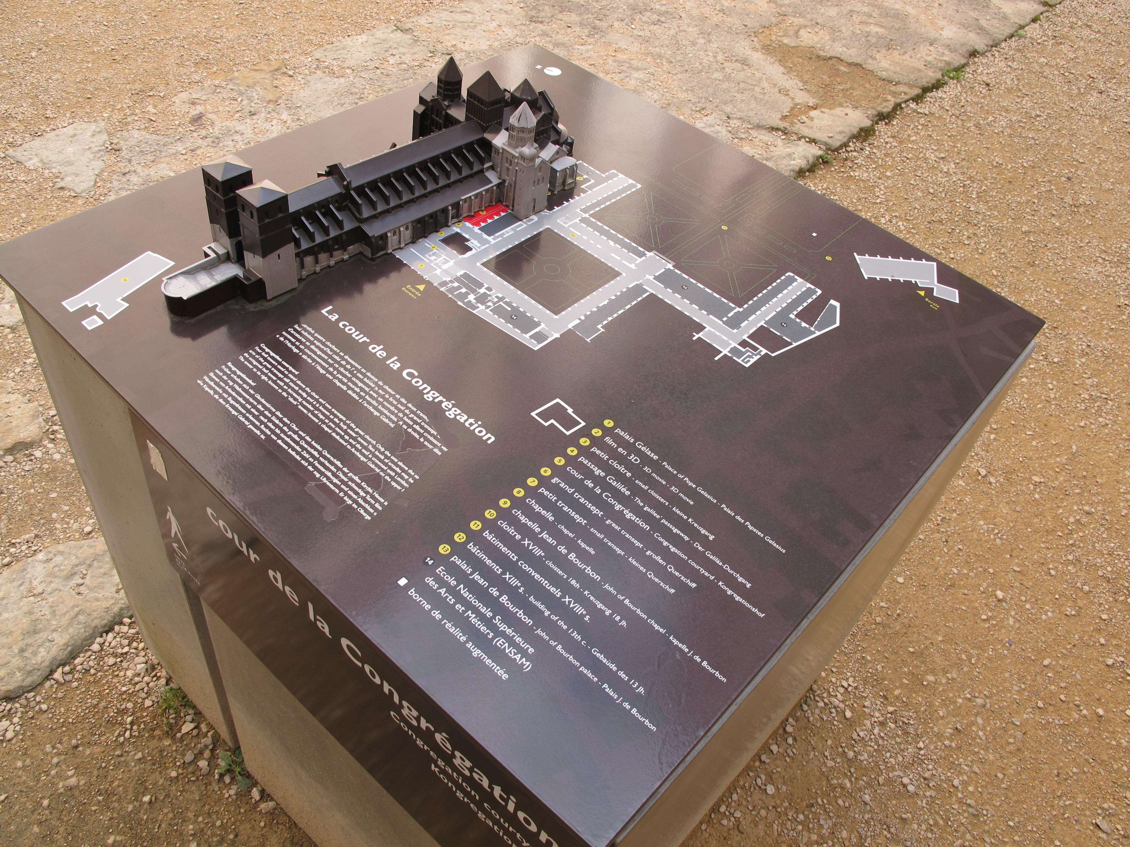 Model d'église de Cluny